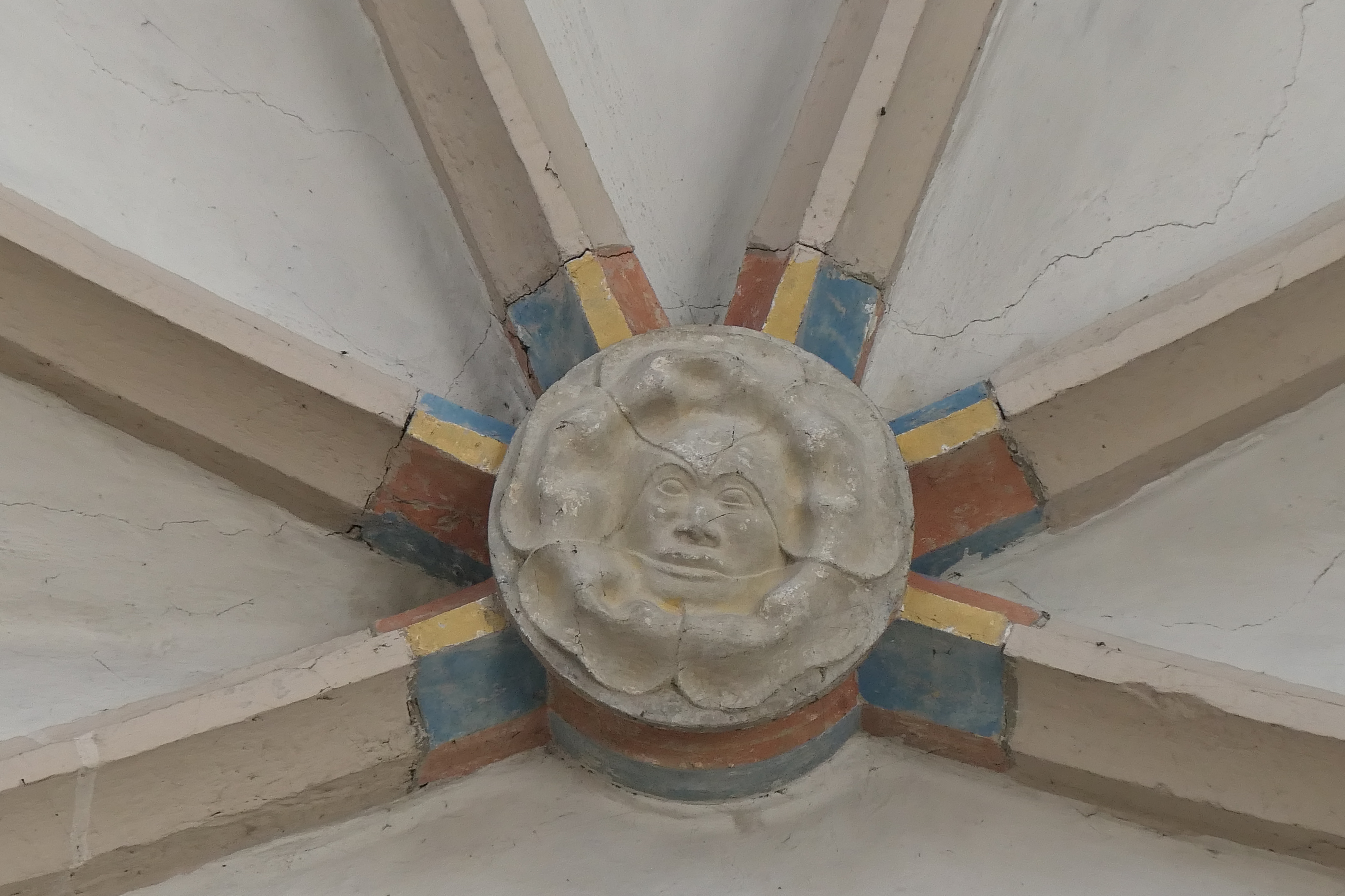 Schlussstein Deckengewölbe Markgröningen mit Blattmaske